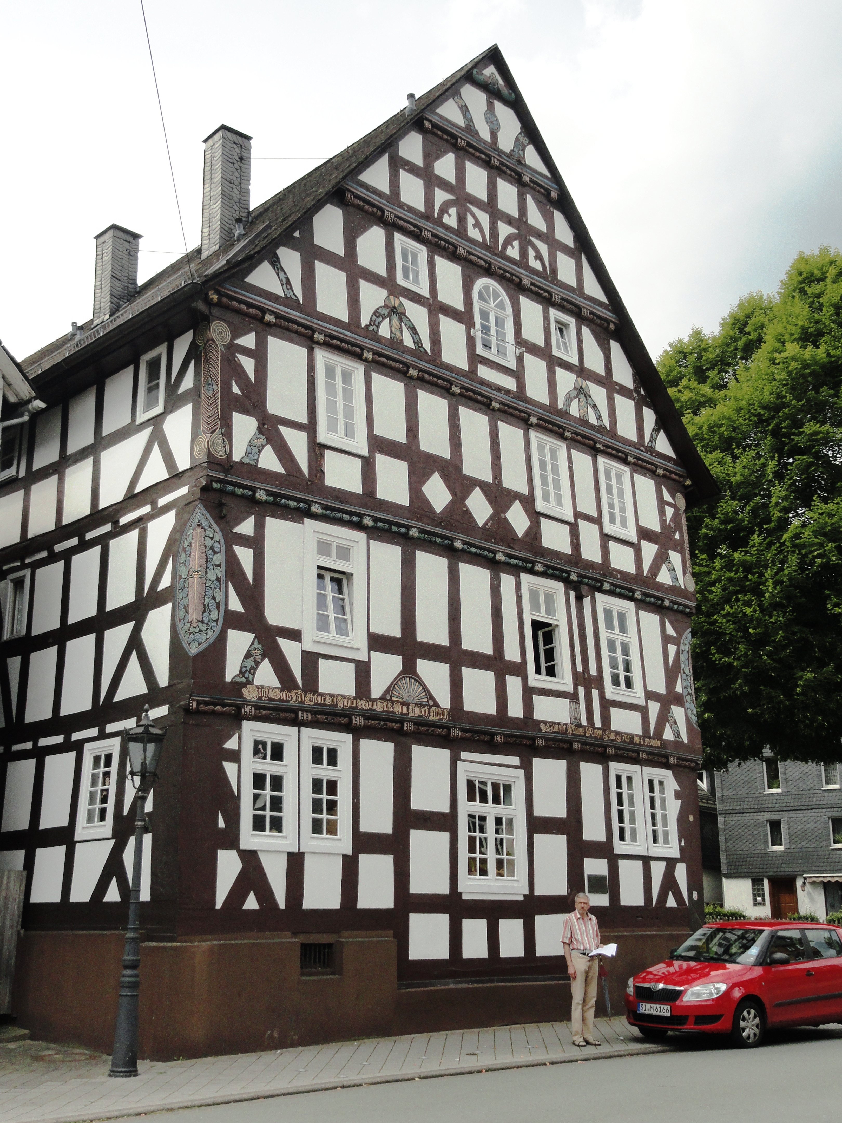 Ein stattliches Fachwerkhaus, Königstraße 49 in Bad Laasphe This is a photograph of an architectural monument.